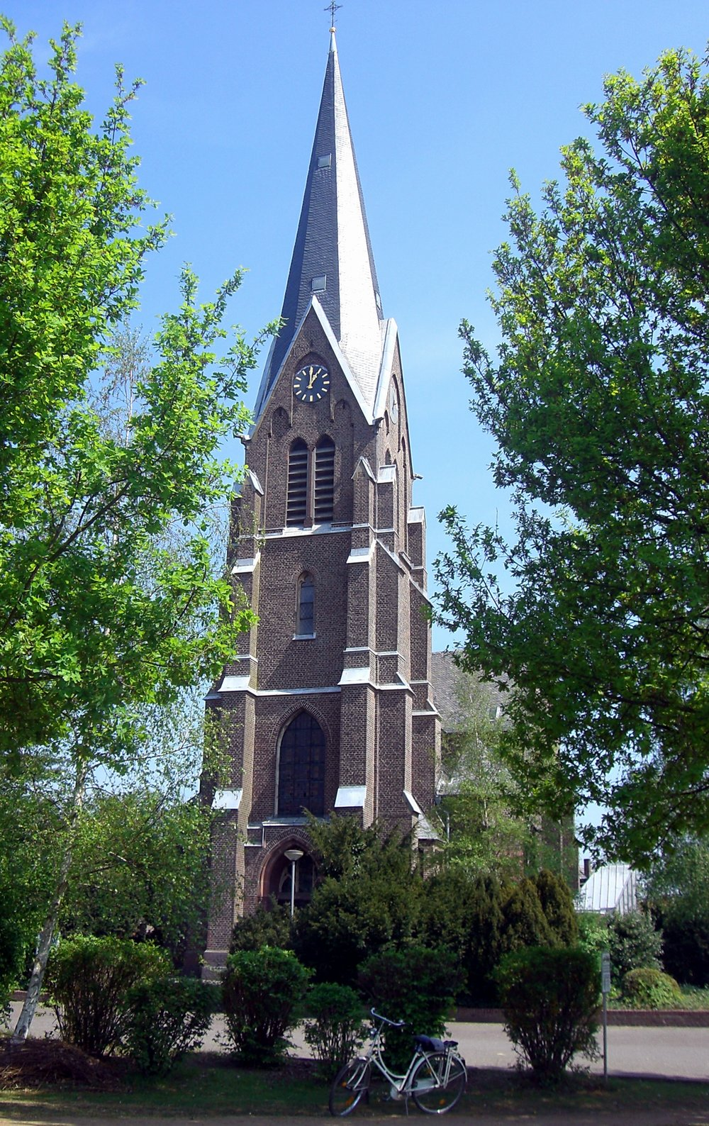 Kirche St. Peter in Boisheim (Viersen). Selbst fotografiert.